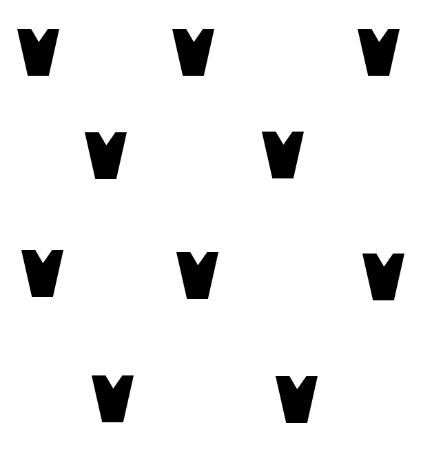 Motif tricot norvégien en forme de V